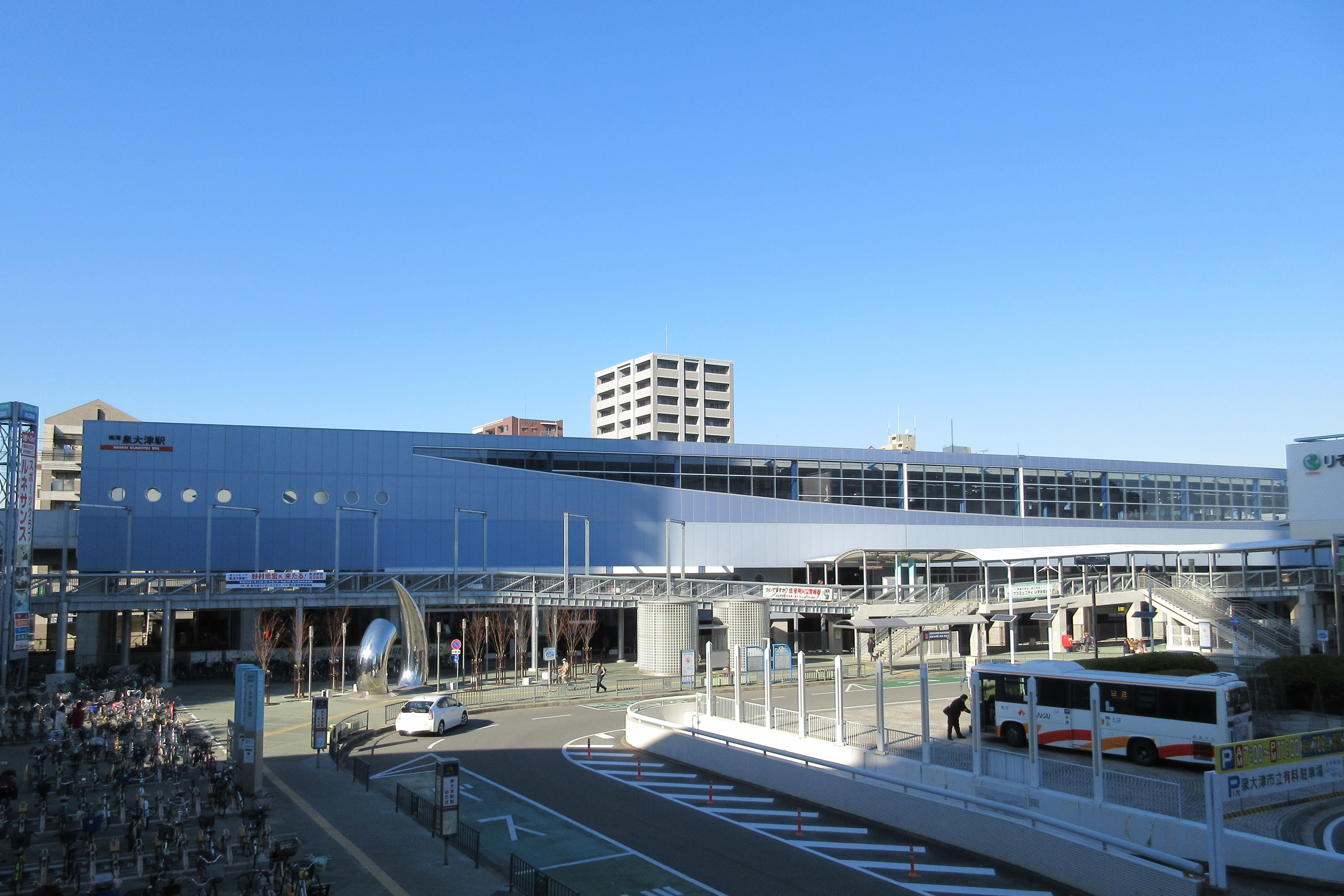 南海電鉄泉大津駅